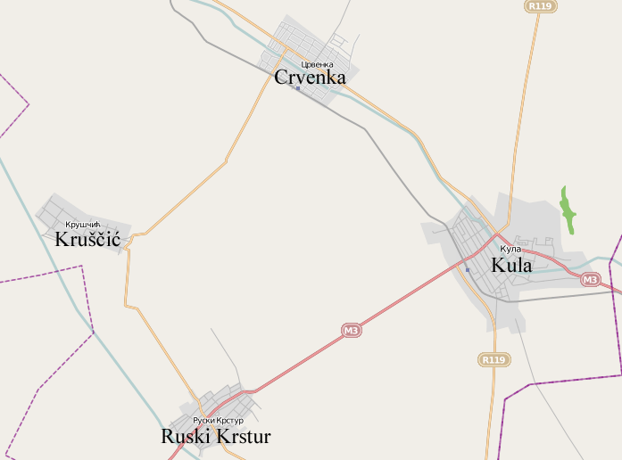 Mapa Kule i okolnih naselja.